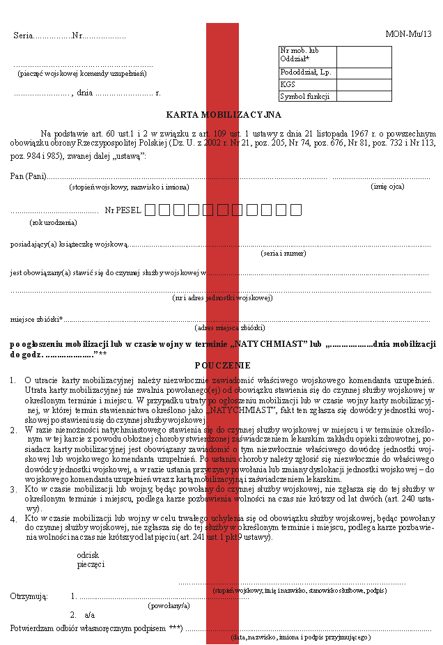 Karta mobilizacyjna z paskiem koloru czerwonego